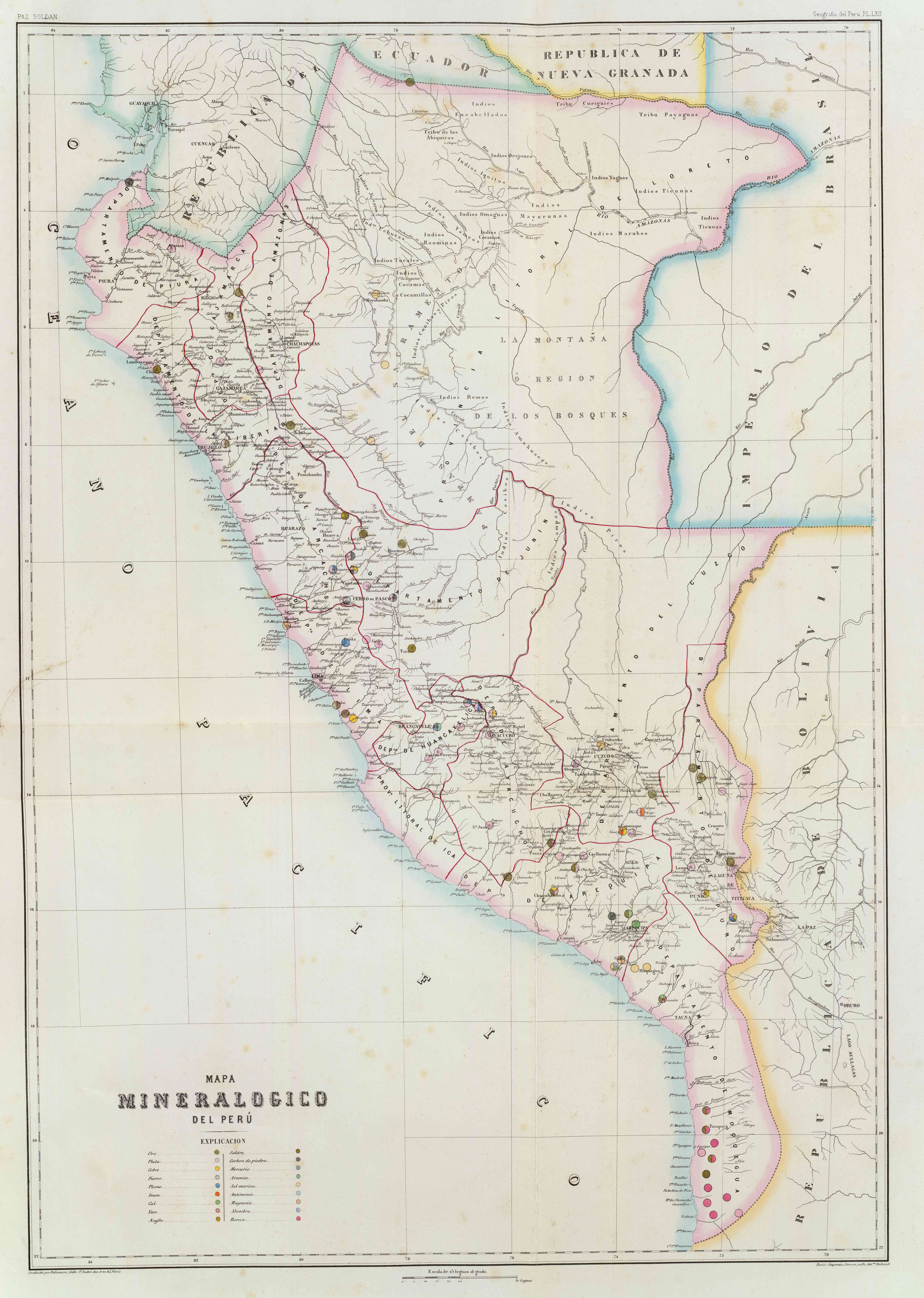 Mapa mineralógico del Perú, hacia 1865. Paz Soldan. Geografia del Peru. Grabado por Delamare, Calle St. Andre des Arts, 45, Paris. Paris, Imp. Janson, Calle Antne. Dubois, 6. (Paris, Libreria de Augusto Durand, 1865)